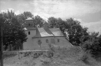 Касперівці (Заліщицький район Тернопільської області). Церква. Вигляд з півночі.